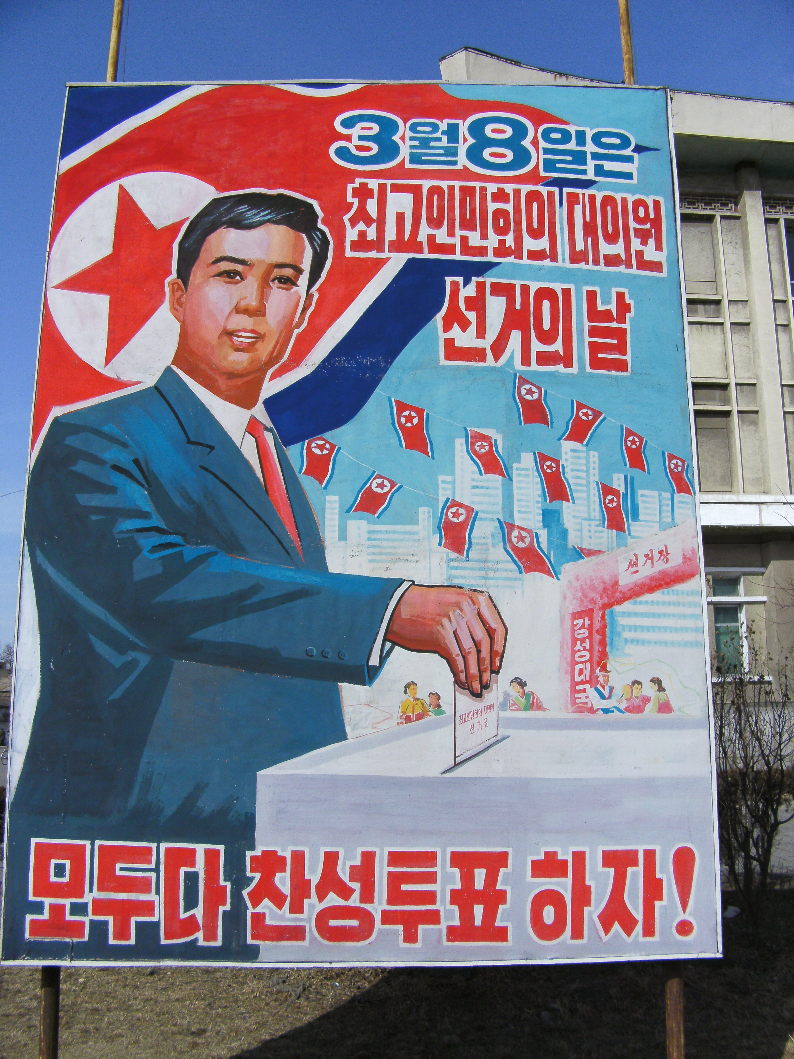 Pyongyang, North Korea (DPRK)